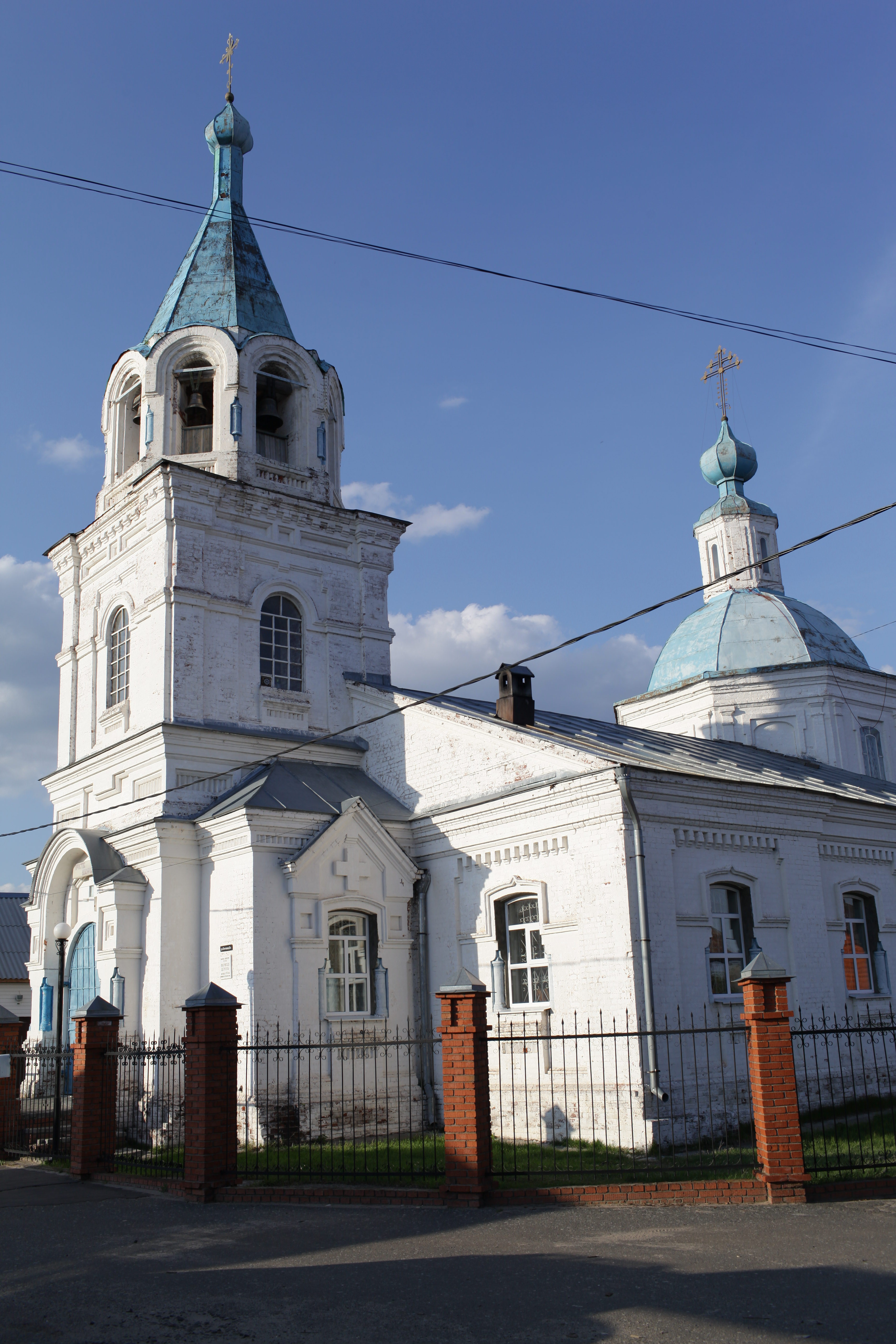 Церковь Покрова Пресвятой Богородицы (1793) в селе Кокшайск Республики Марий Эл